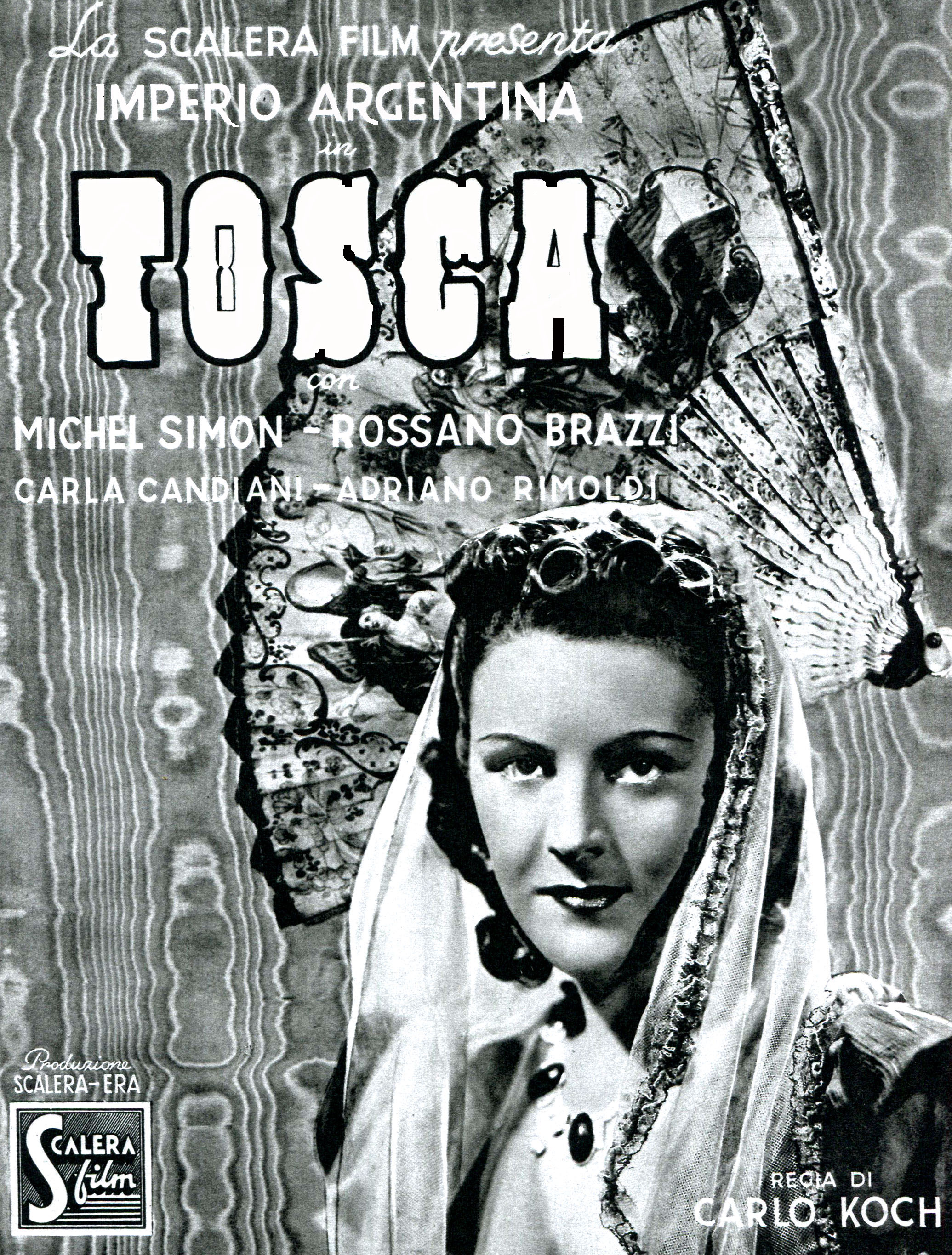 Tosca 1941 - immagine promozionale (Renoir + Koch)